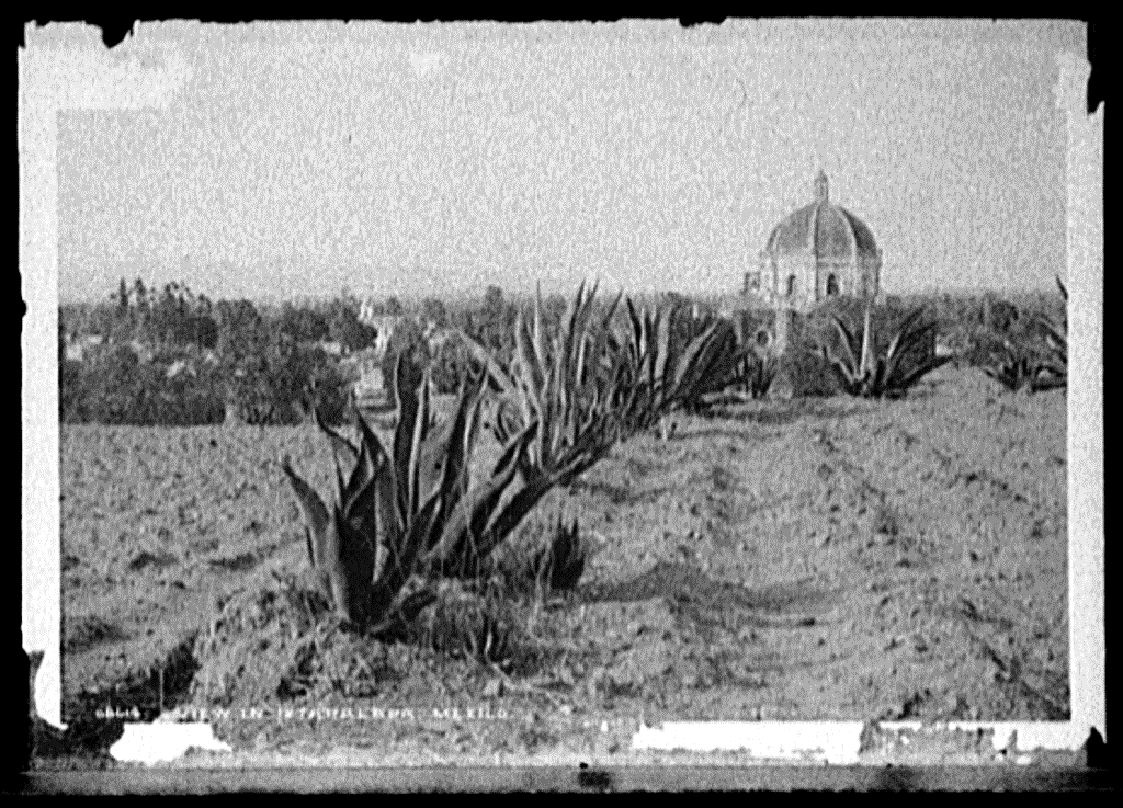 Vista de Iztapalapa (México) desde el cerro de la Estrella. La cúpula que se observa es del santuario de La Cuevita. La imagen aparece en el catálogo de la Biblioteca del Congreso de los Estados Unidos con el título View in Ixtapalapa.